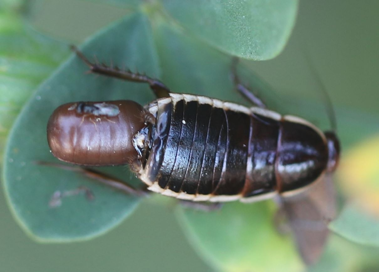 Schabe Loboptera decipiens mit einer Oothek und einem Hautflügler darauf sitzend; am 25. Juni 2020 an der Côte d’Azur